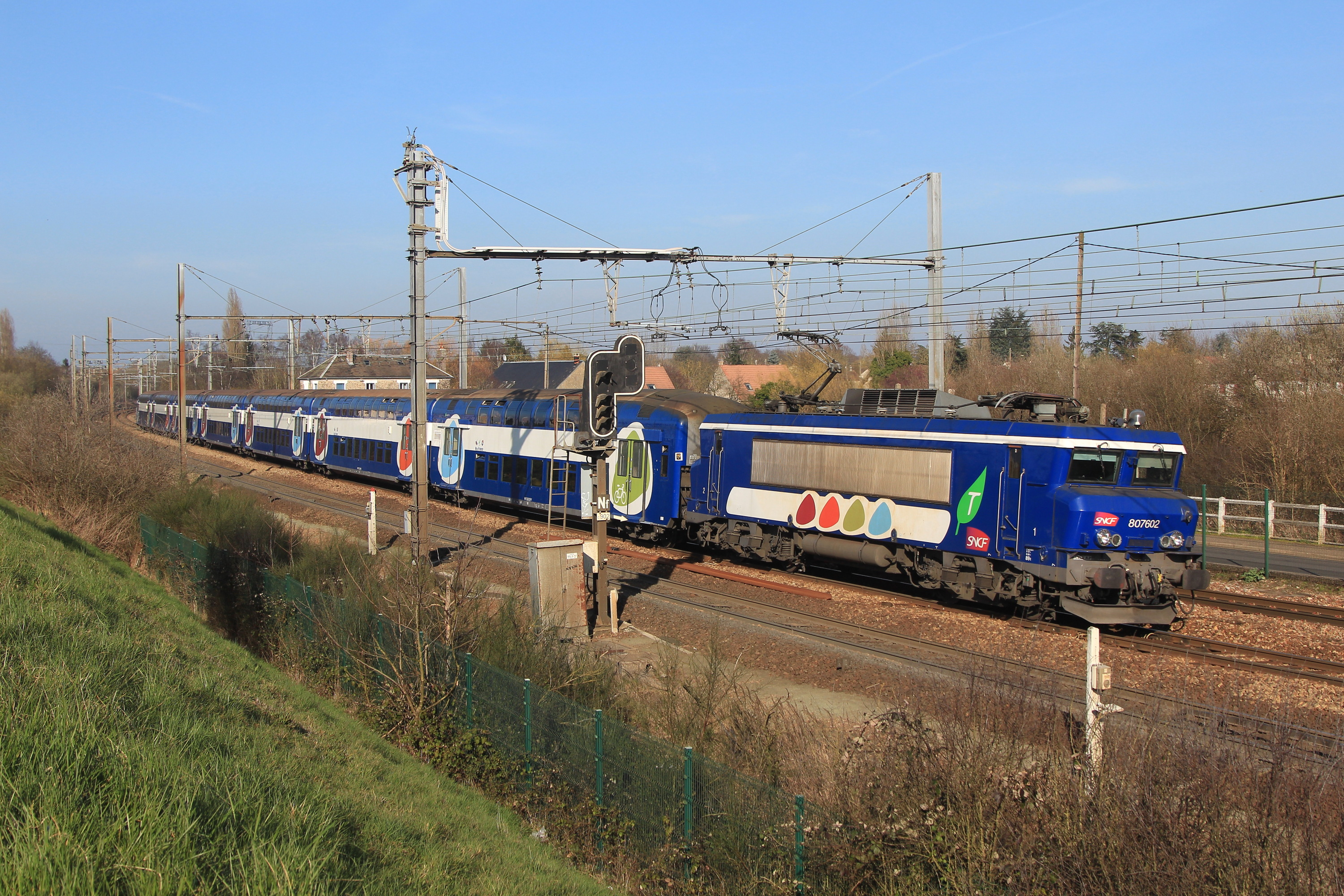 La BB7602 et un coupon de voitures VB2N, le tout en livrée Transilien à berlingots arrive en gare du Perray, en direction de Rambouillet.